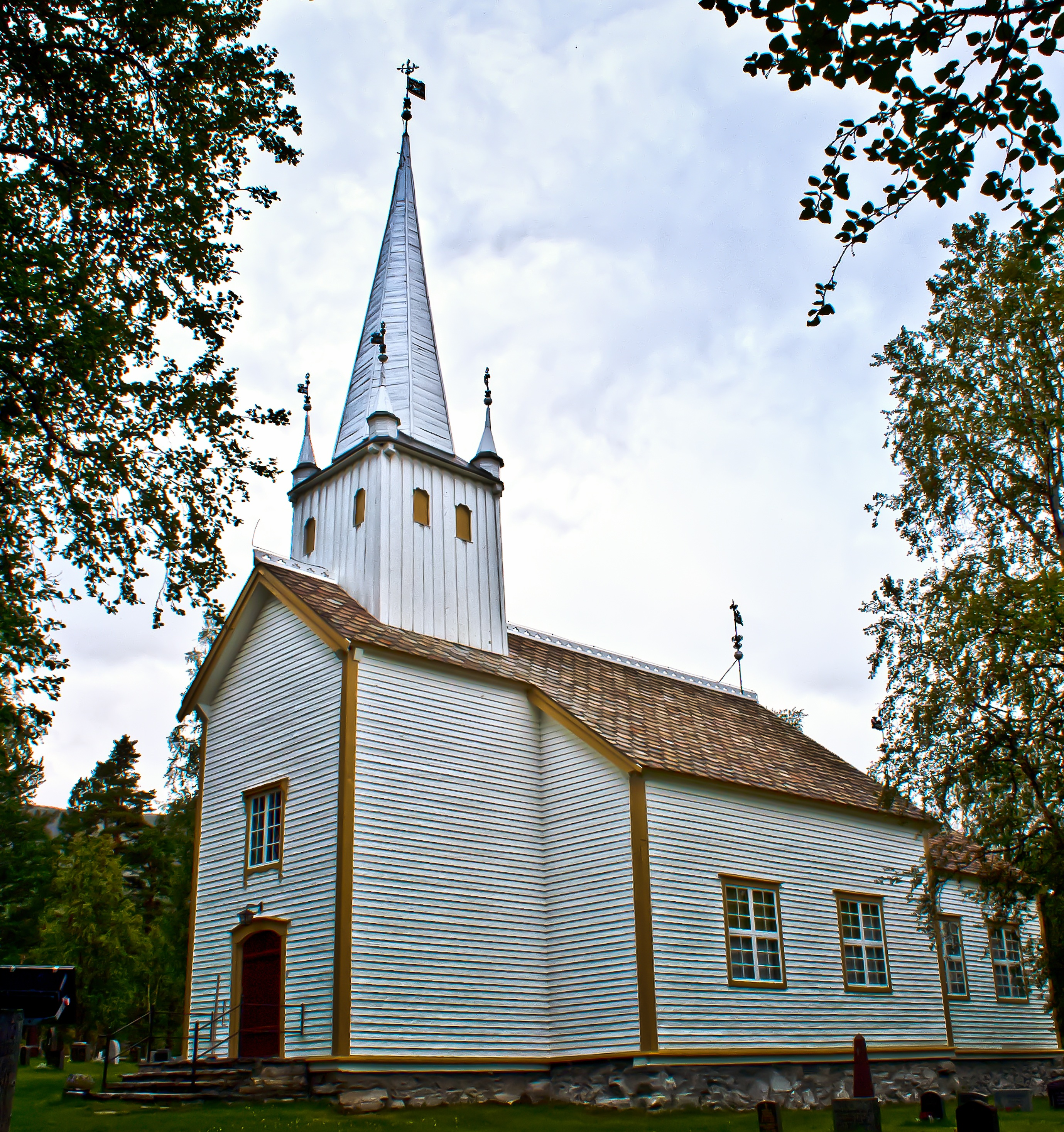 Lesjaskog kirke